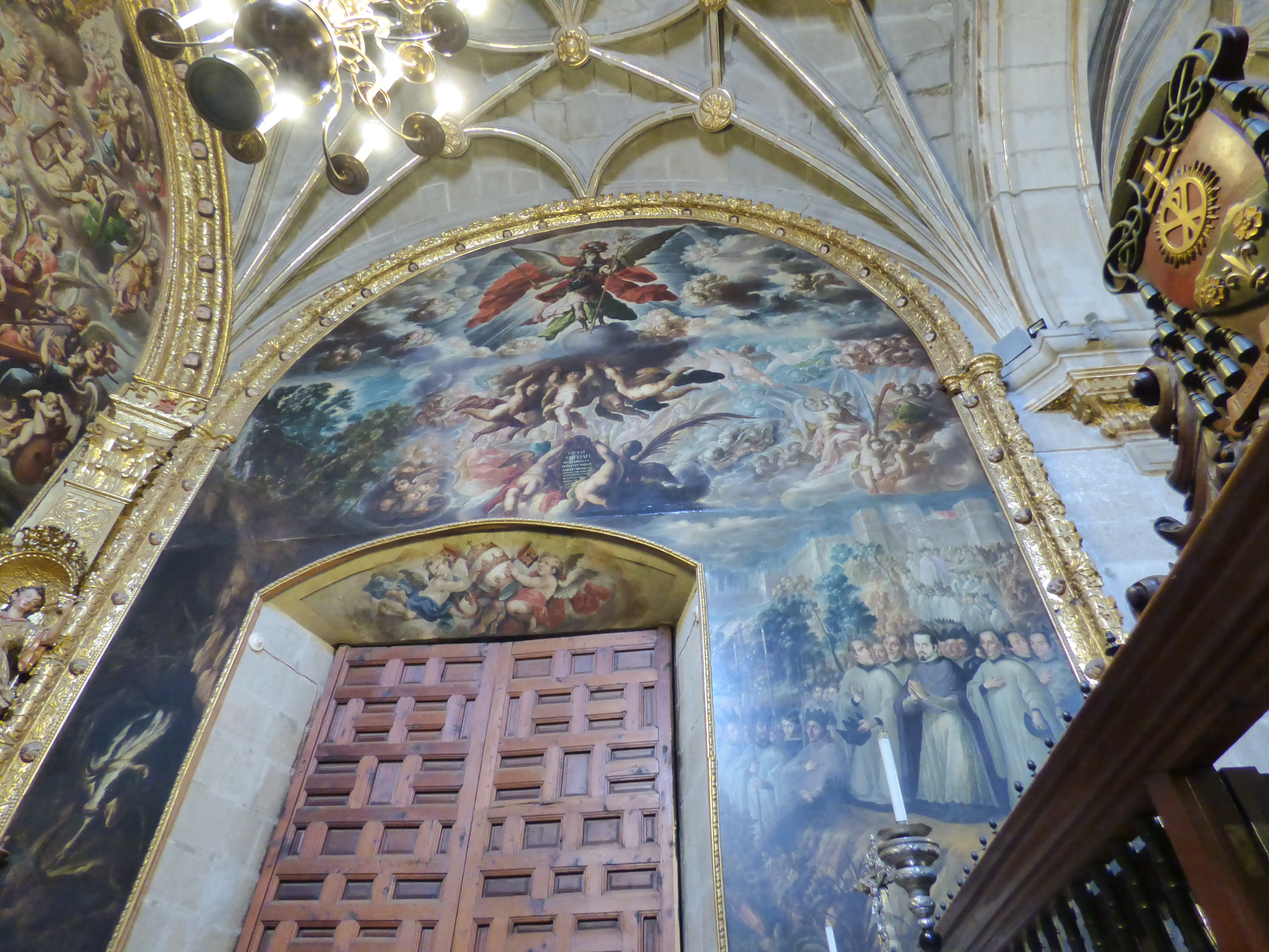 Apoteosis de San Miguel de Cristóbal de Villalpando en la Sacristía de la Catedral de la Ciudad de México